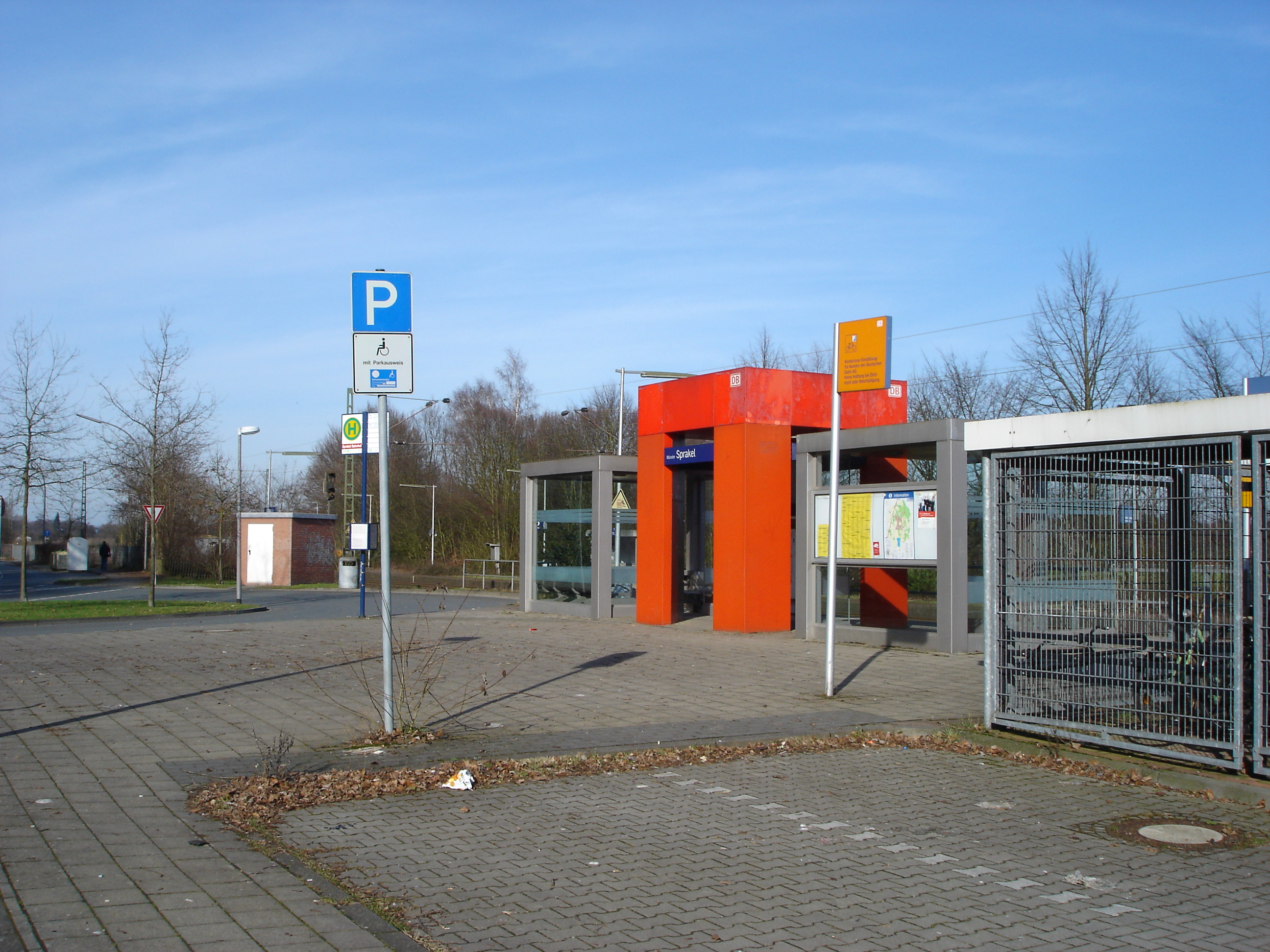 Train station in Münster-Sprakel, Germany